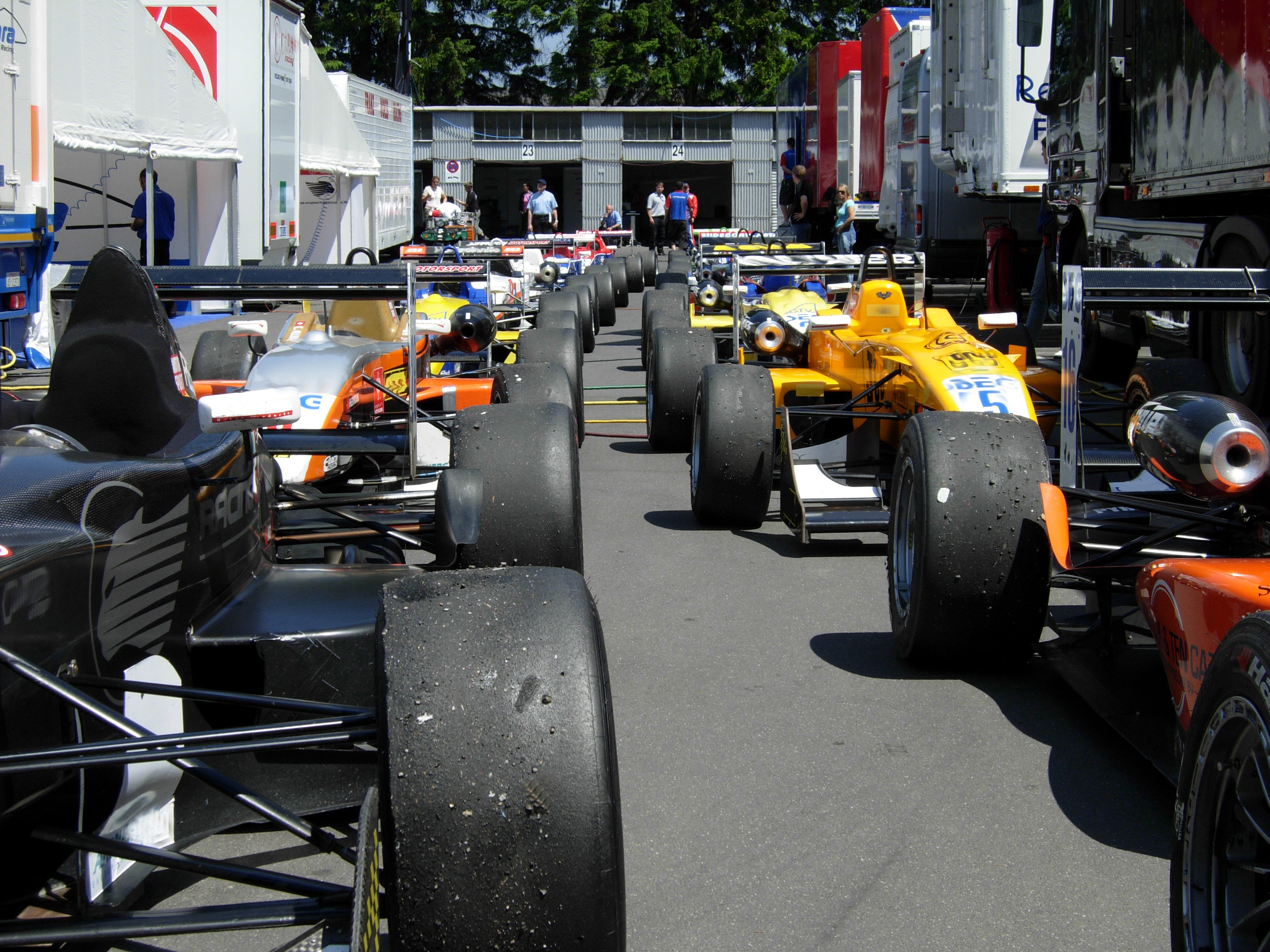 Parc ferme eines Formel 3 Rennens auf dem Nürburgring (im alten Fahrerlager)